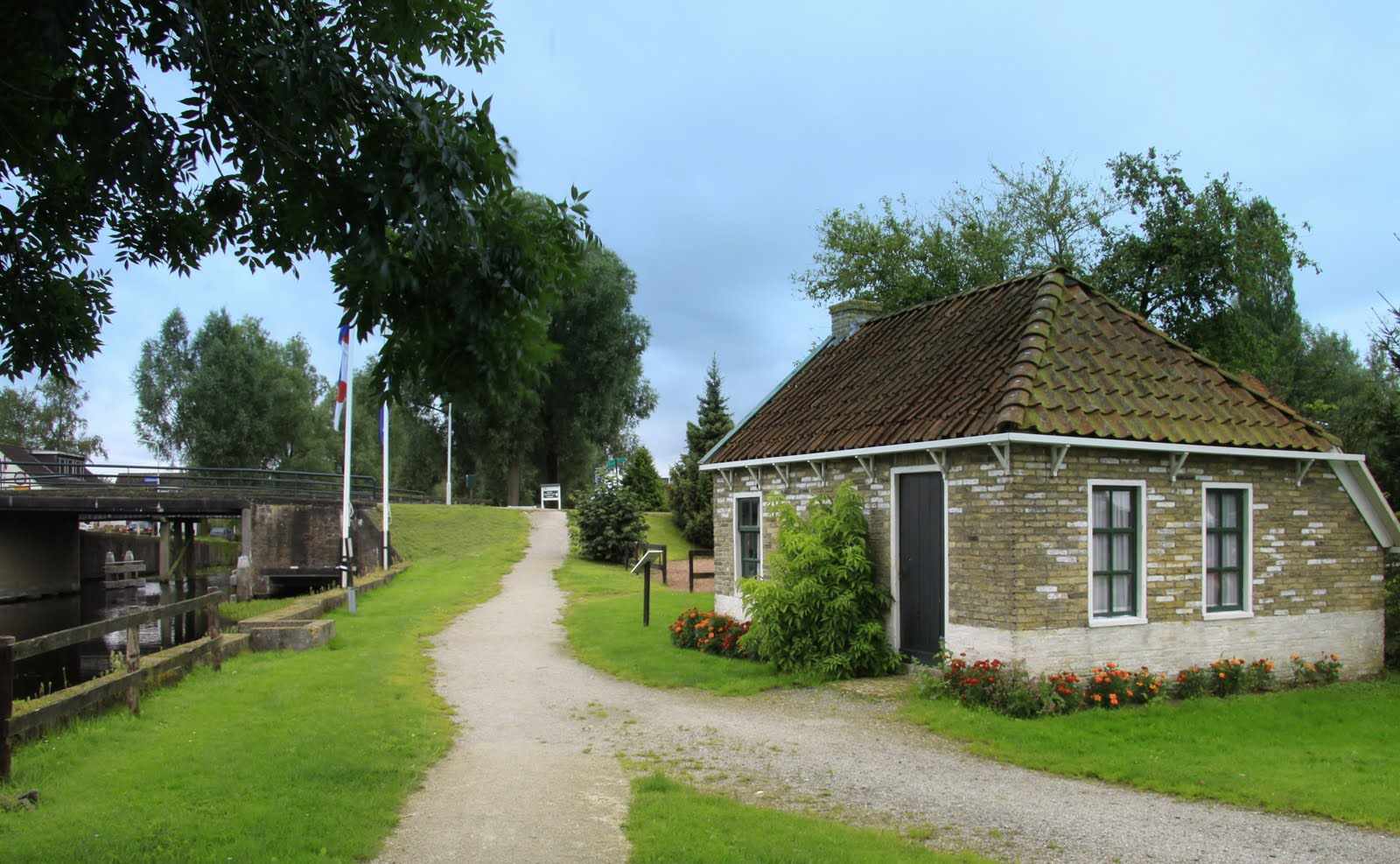 It Damhus, museum in Nij Beets